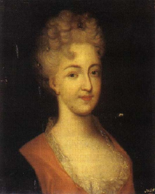 Charlotte Christine of Brunswick-Lüneburg Г.Д. Молчанов Портрет принцессы Софии - Шарлотты Брауншвейг-Вольфенбюттельской